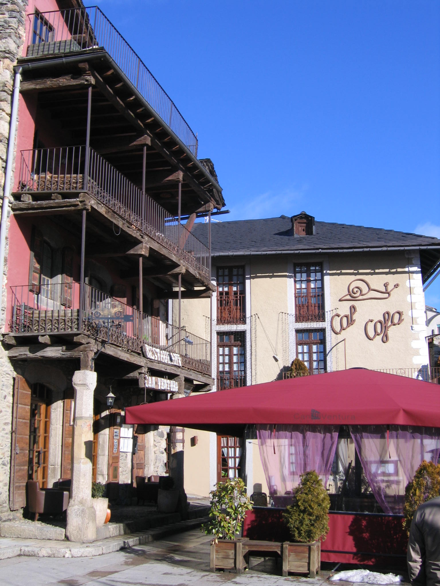 Enclave espagnole de Llívia, plaça major.